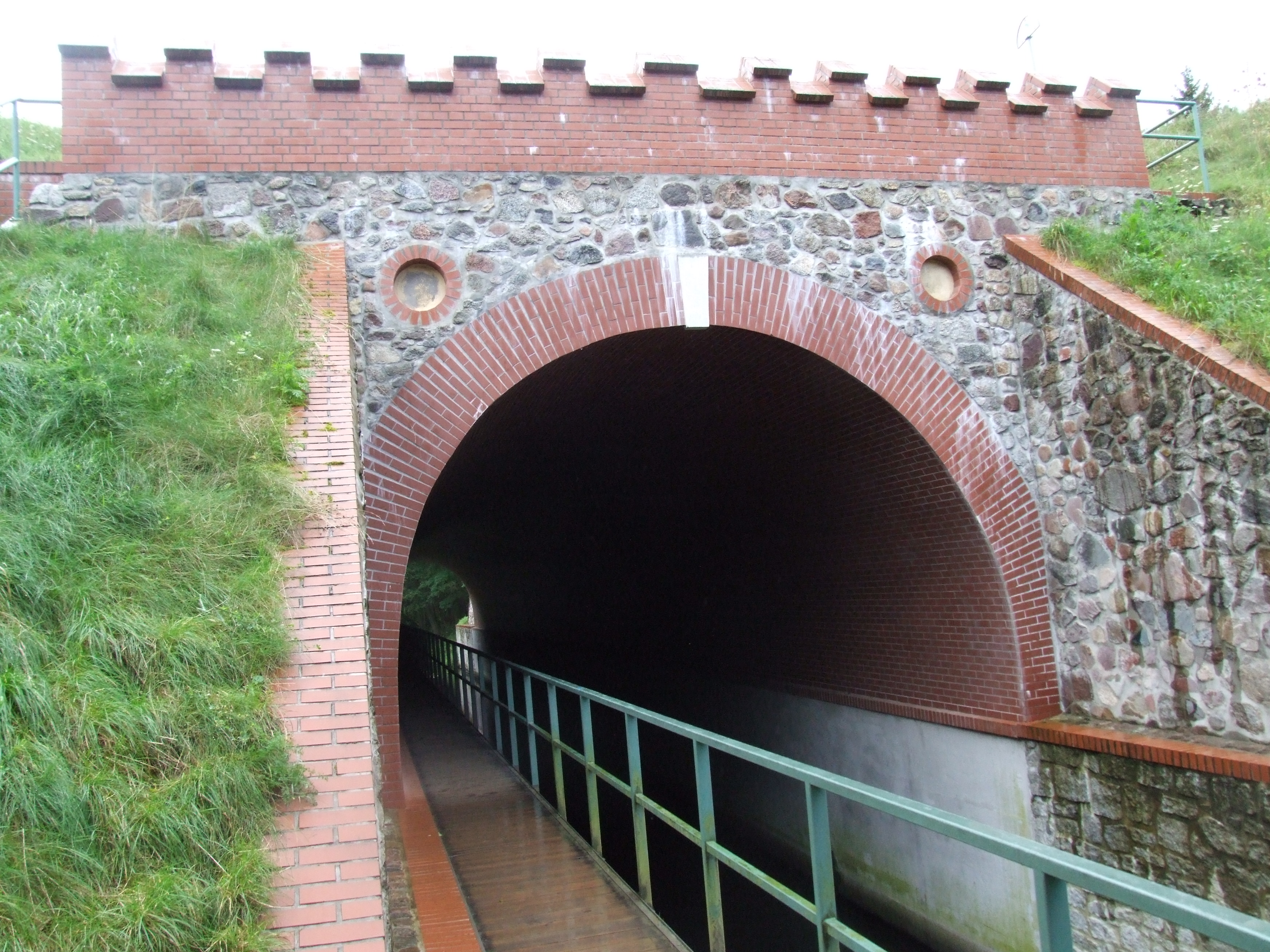 Fojutowo - Akwedukt Fojutowo